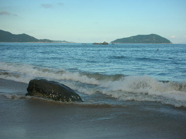 中文（香港）: 從塘福泳灘遠望石鼓洲。